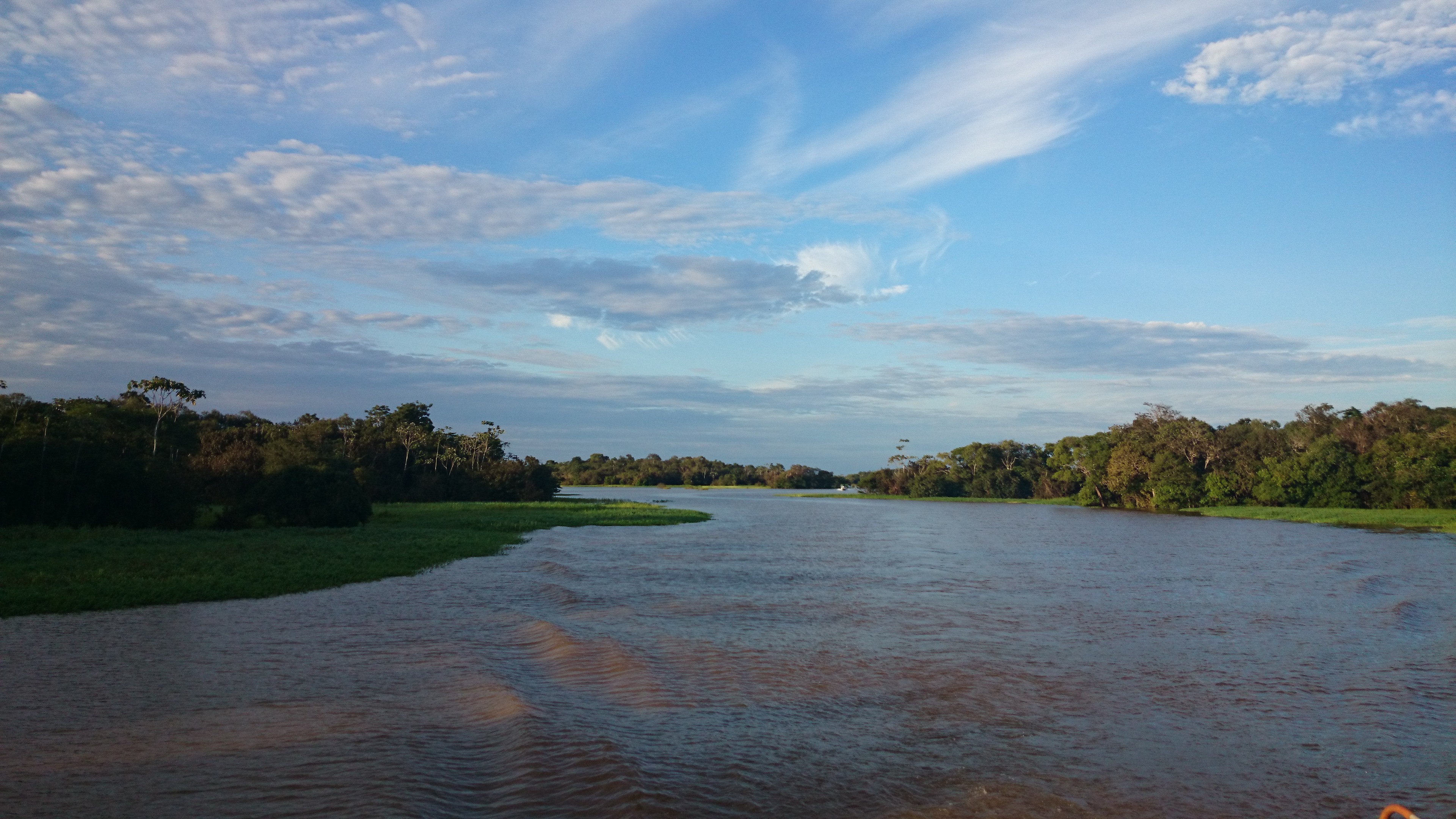 fotografia do rio Paraná do Anamã